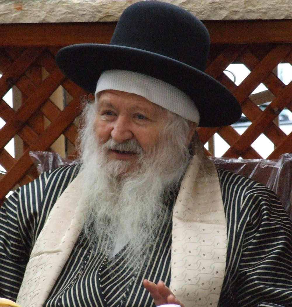 הרב אליהו ליאון לוי זצוק"ל